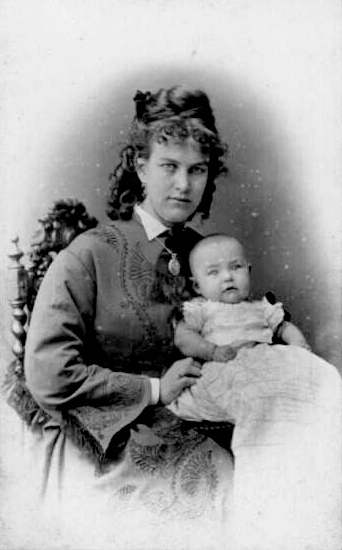 Ida Boy-Ed, deutsche Schriftstellerin. Fotografie um 1873.